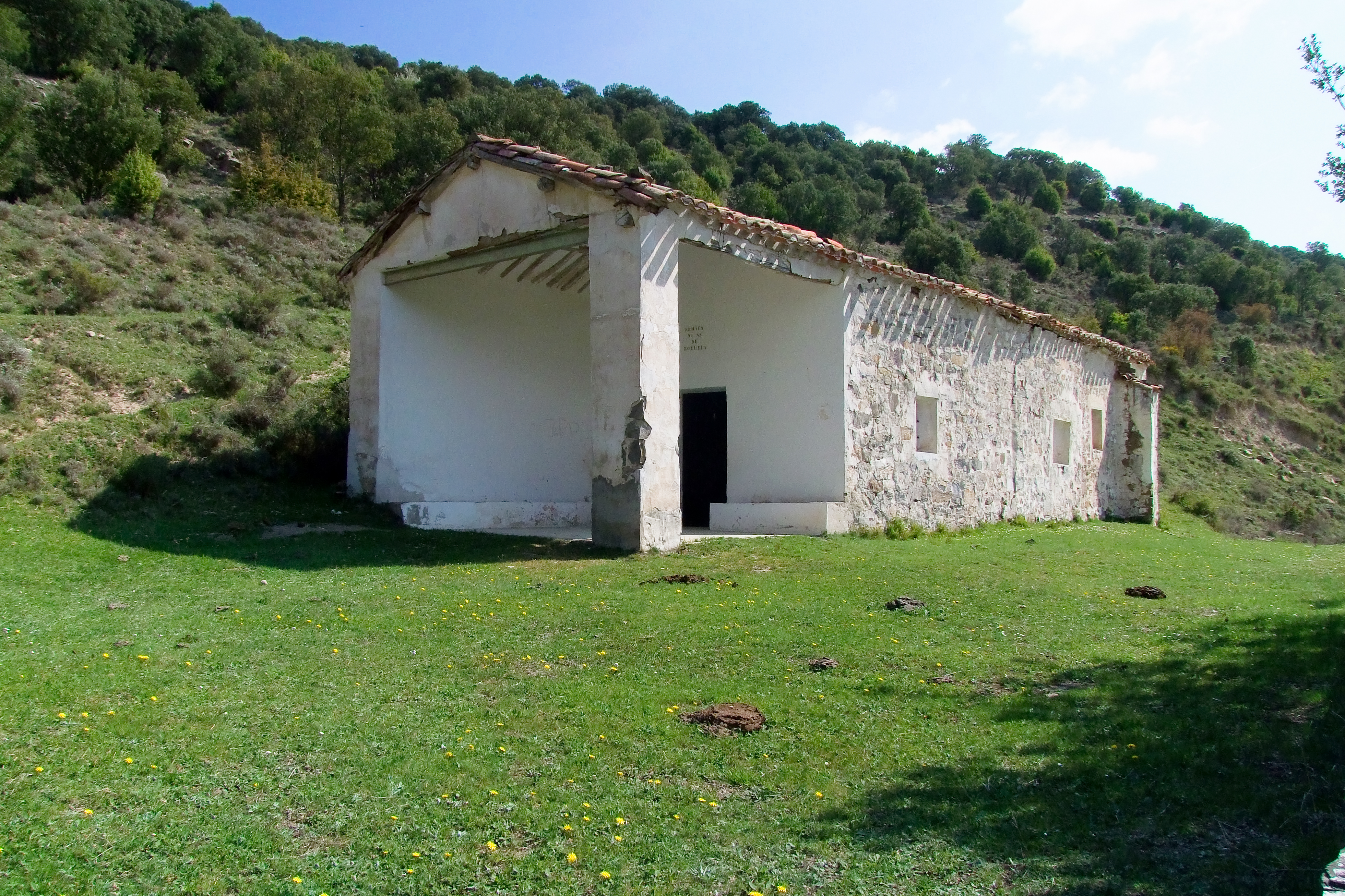 Ermita de la Virgen de Royuela en la localidad de Luezas, La Rioja - España